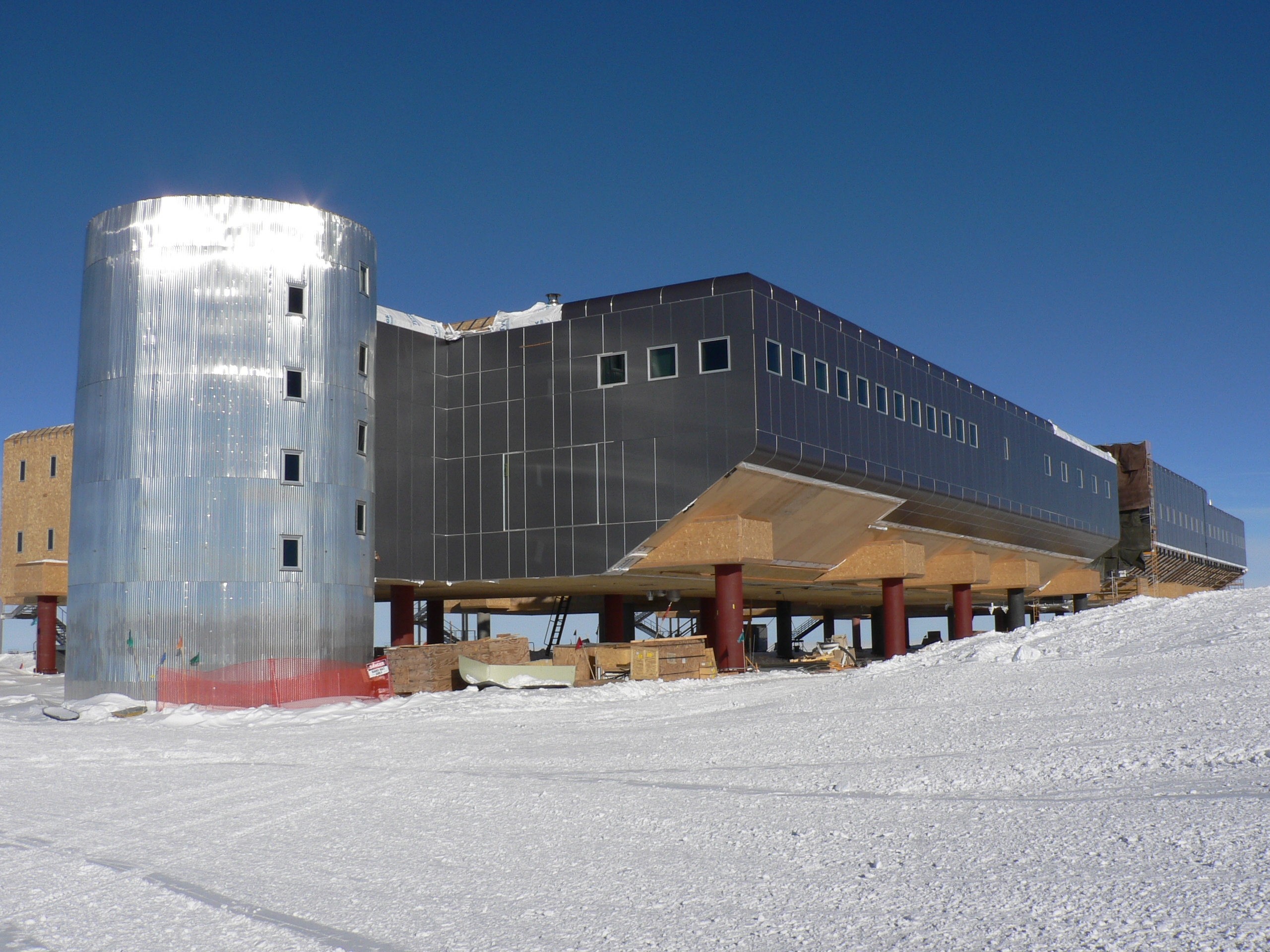 new Amundsen-Scott-Station left side details